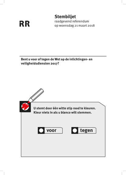 Wahlzettel (stembiljet) zum Referendum in den Niederlanden über das Gesetz über die Nachrichten- und Sicherheitsdienste 2017